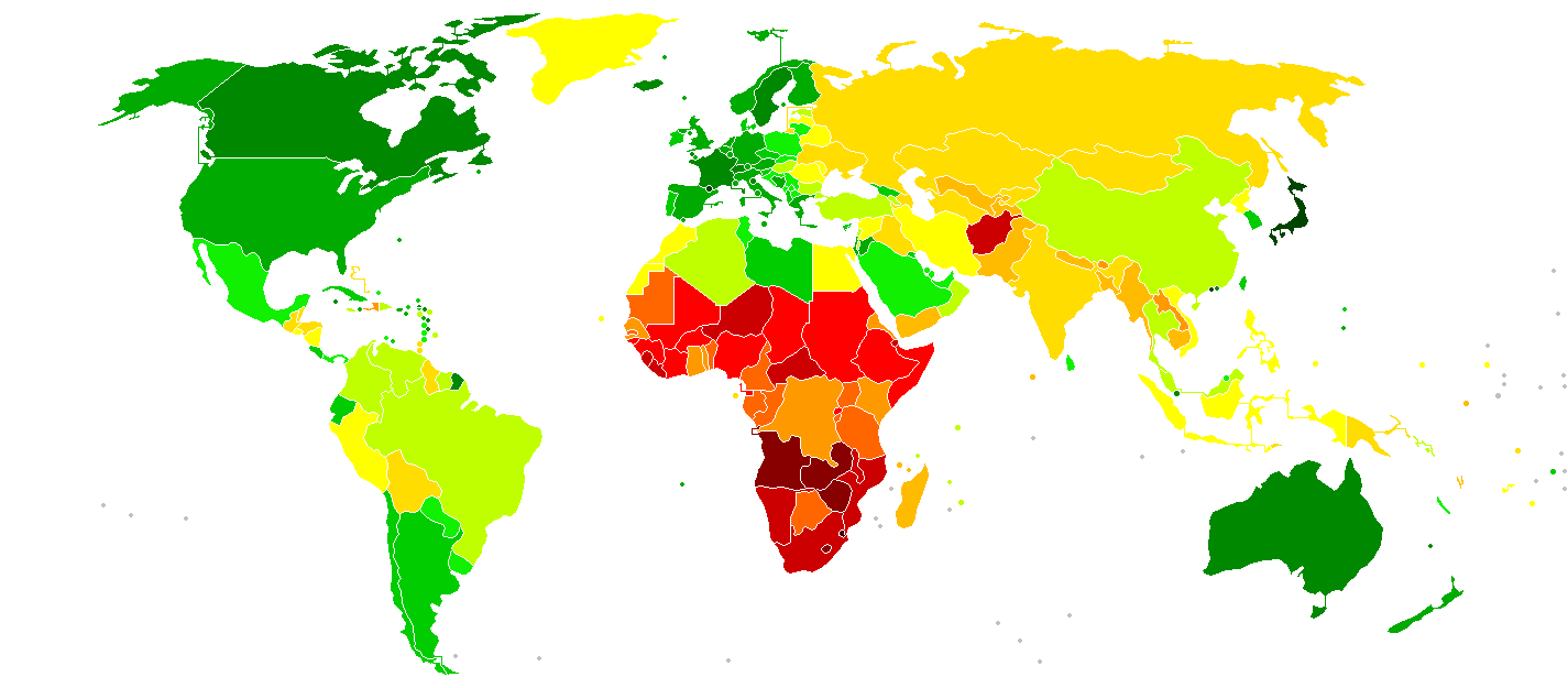 en (original): This map indicates the Life expectancy at birth in the world as of 2007. Another map already exists, although based on 2005 estimations and quite a bit less detailed. You can find it below. The original blank world map can be found here : fr (original): Cette carte expose l'espérance de vie à la naissance dans le monde en 2007. Une autre carte existe mais basée sur des estimations de 2005 et beaucoup moins détaillée. Vous pouvez la trouver ci-dessous. La carte "vide" du monde se trouve ici